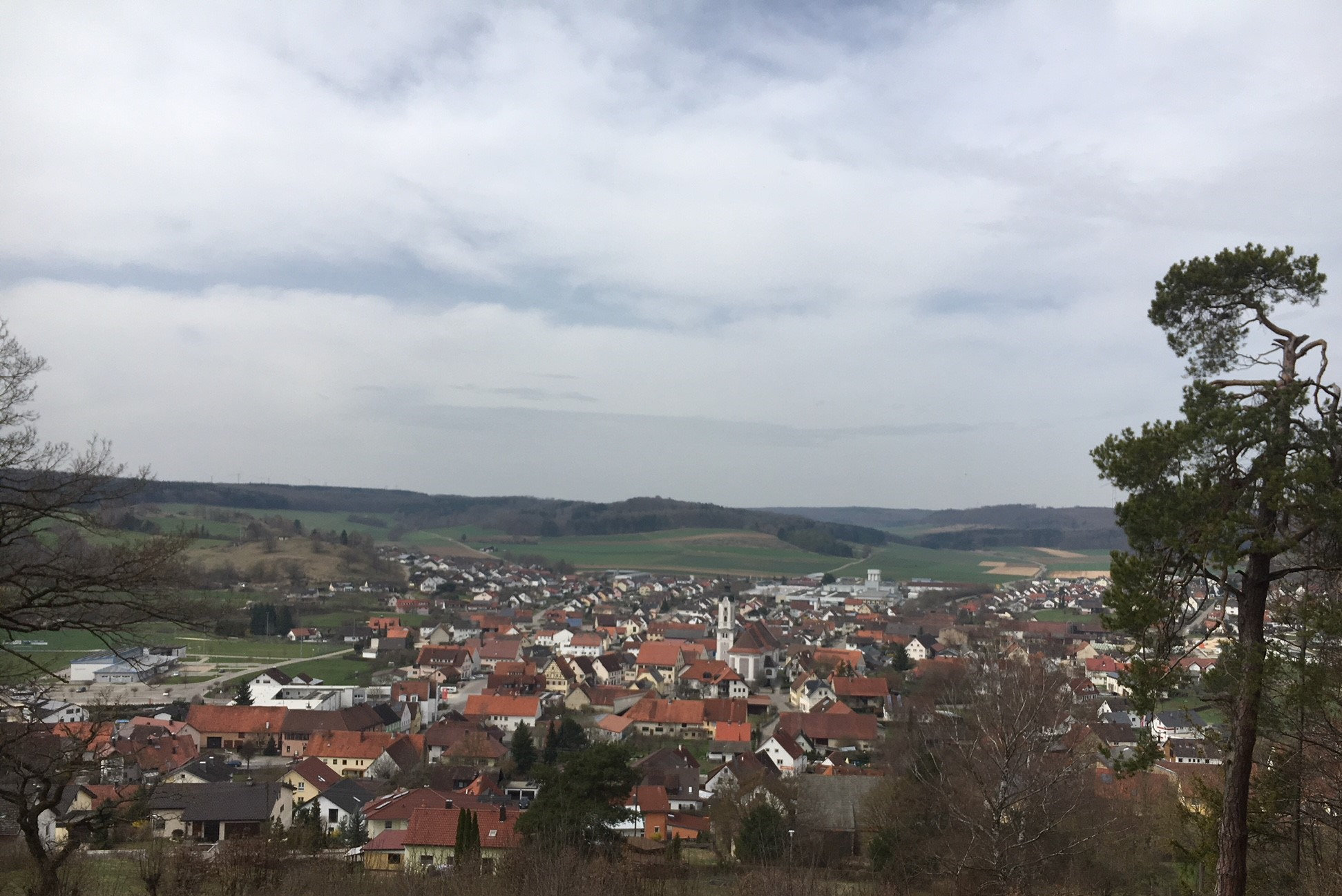 Blick vom Englischen Garten auf Dischingen